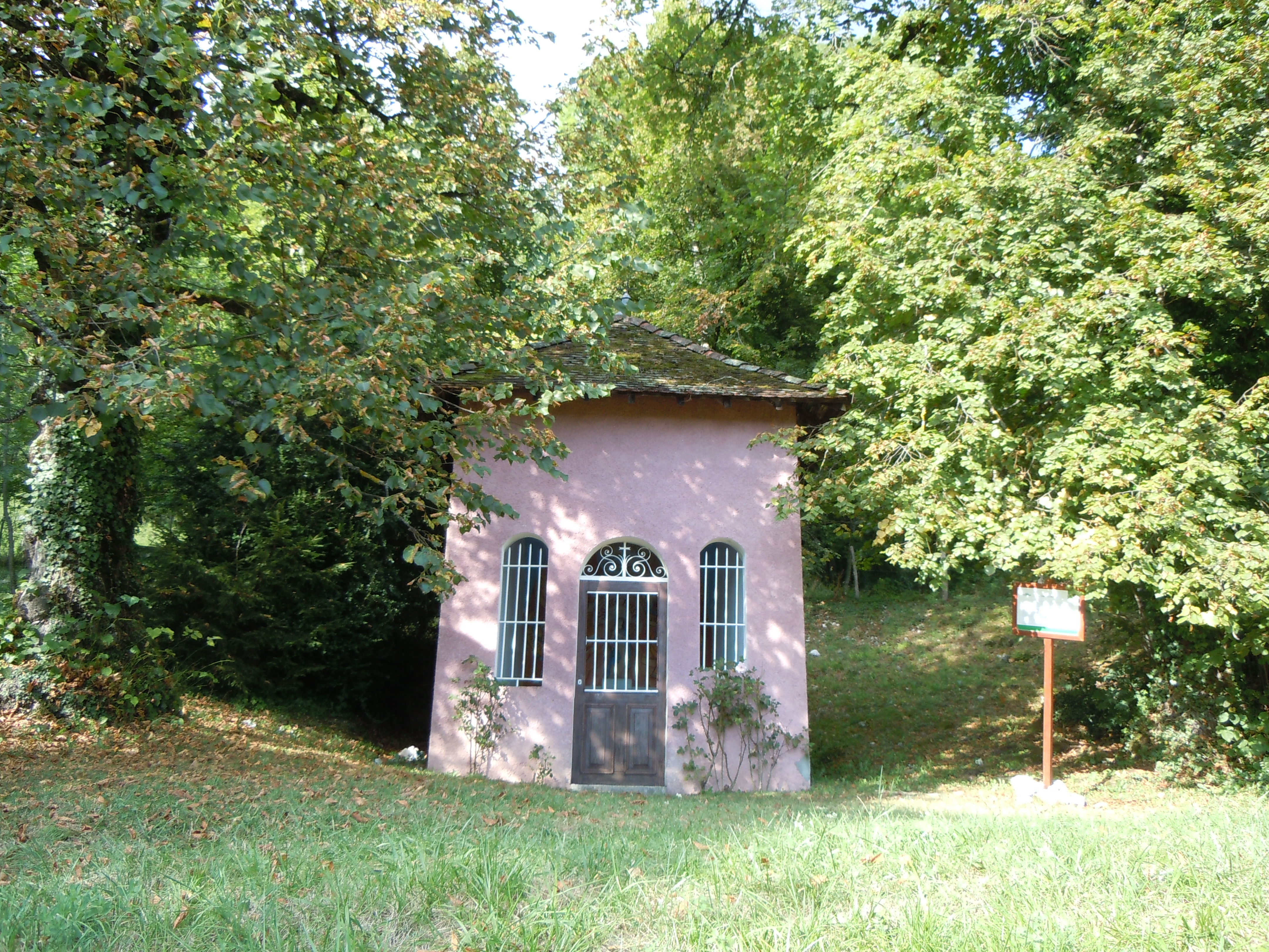 Chapelle Sainte Rose (Nances) - Savoie - France